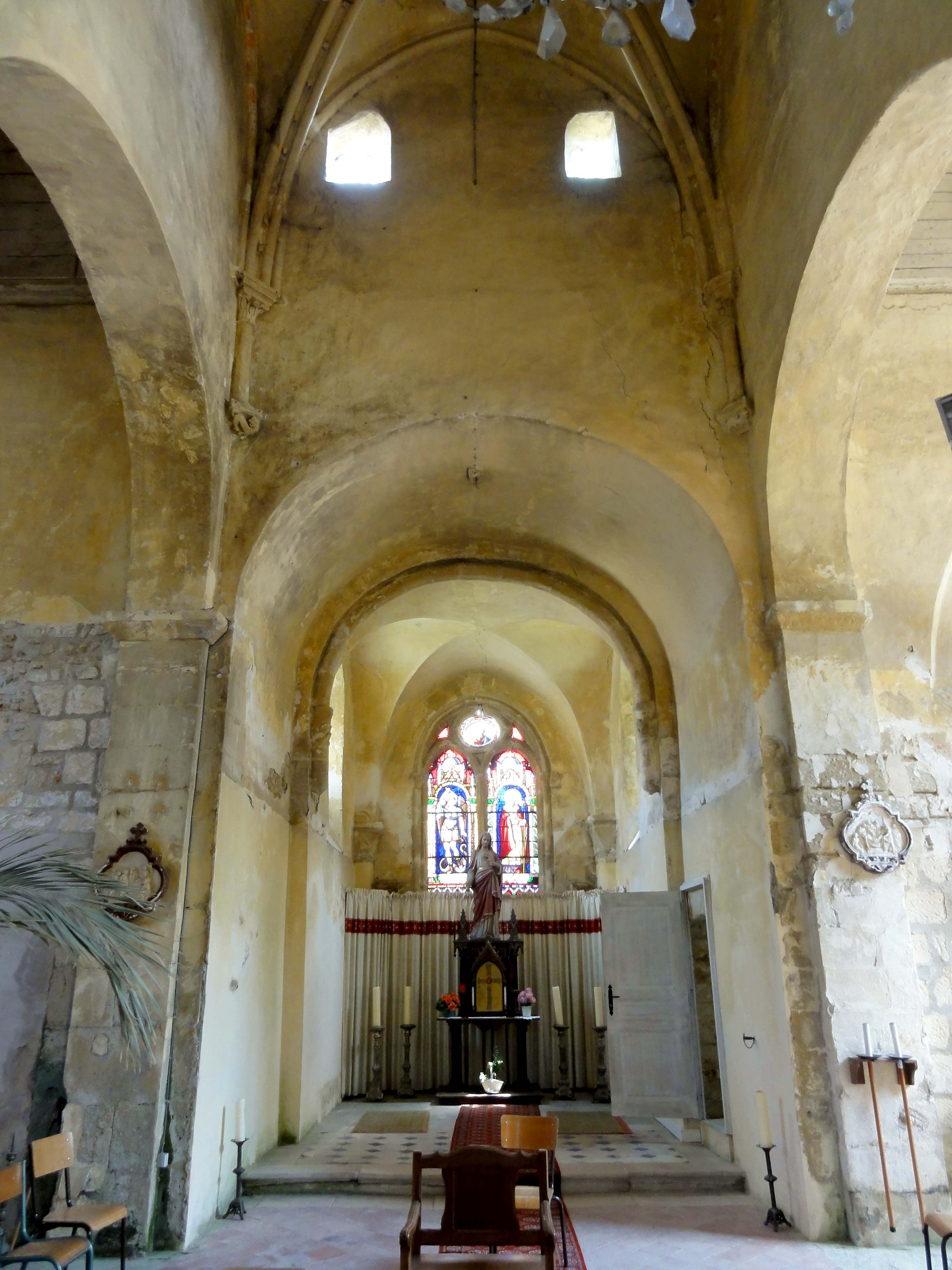 Intérieur de l'église (voir titre).